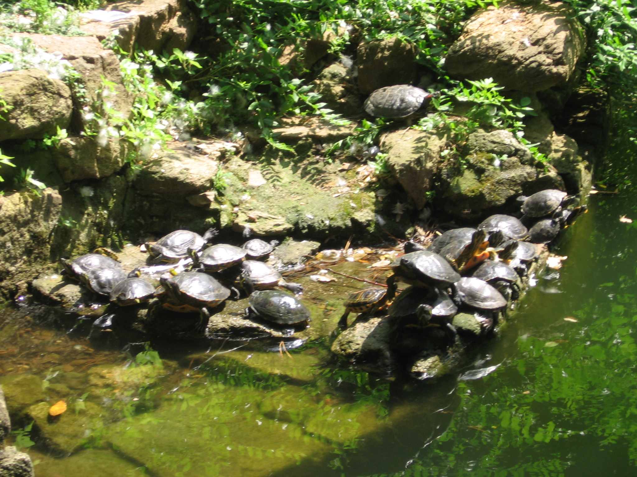 Tortugas del parque del Laberinto.